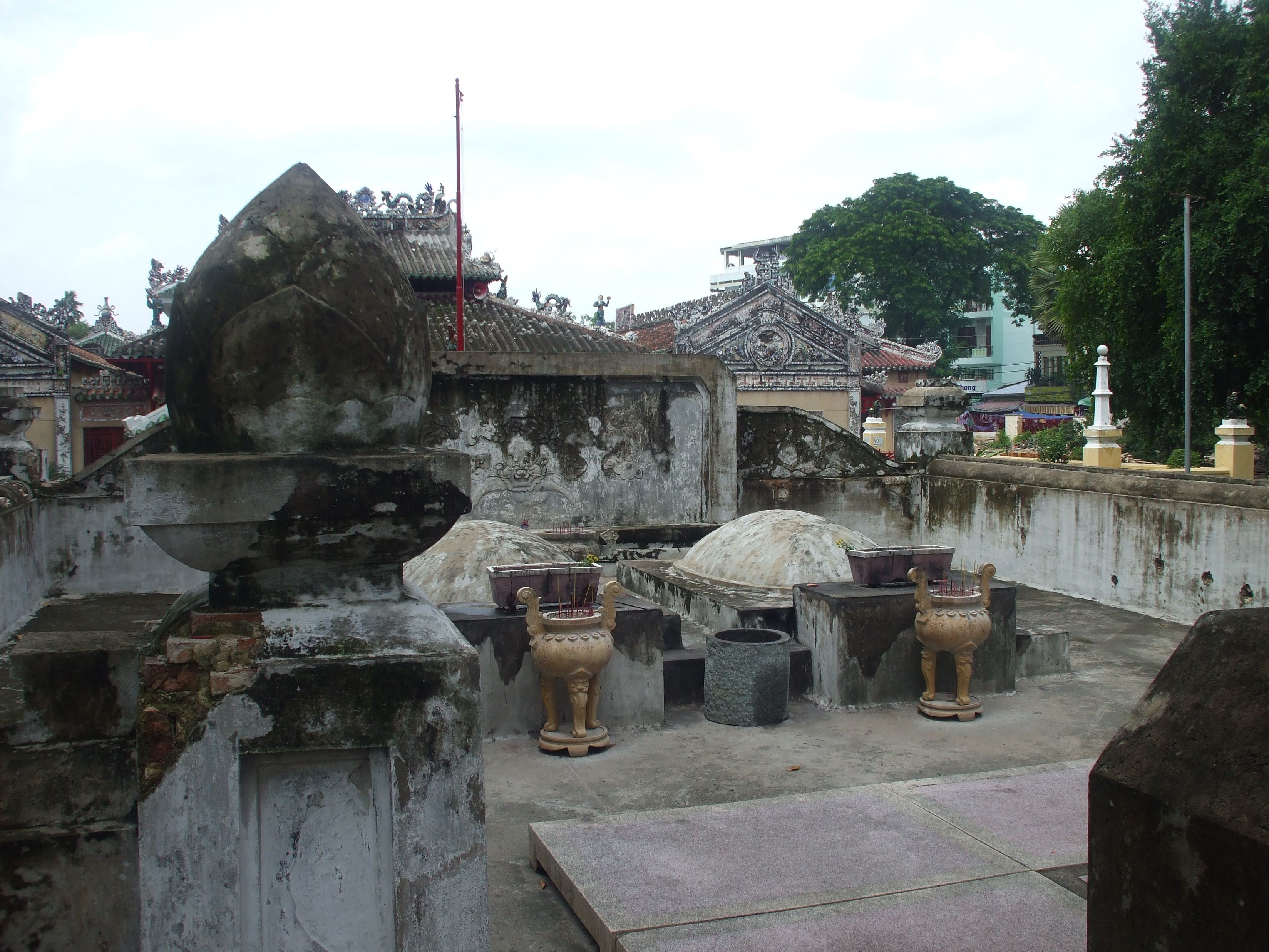 Lăng Lê Văn Duyệt còn được gọi là Lăng Ông Bà Chiểu; nay ở số 1, đường Vũ Tùng, quận Bình Thạnh, Thành phố Hồ Chí Minh, Việt Nam).